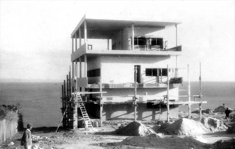 Villa Baizeau (Carthage)